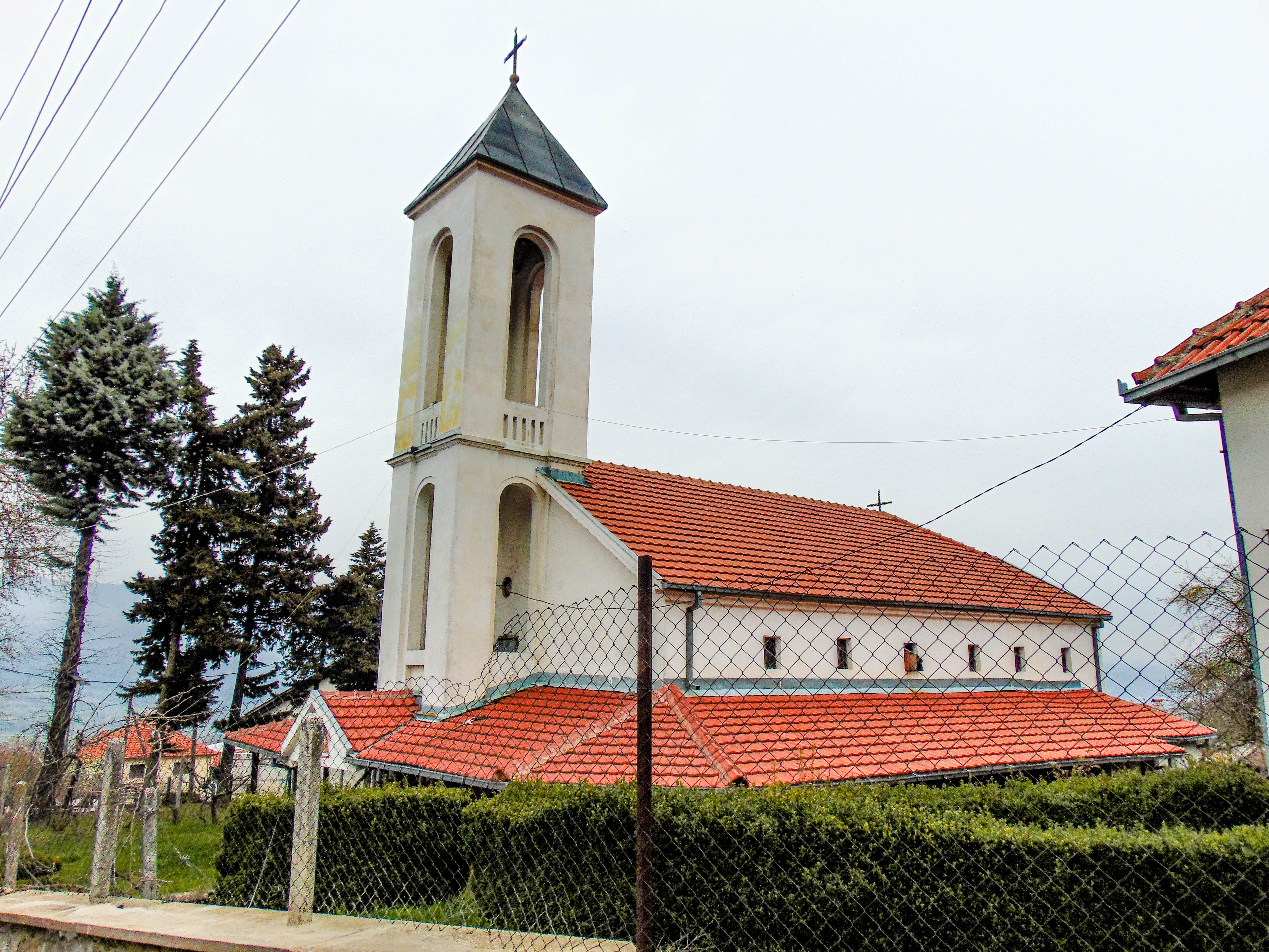 Црква „Св. Троица“ - Смолари